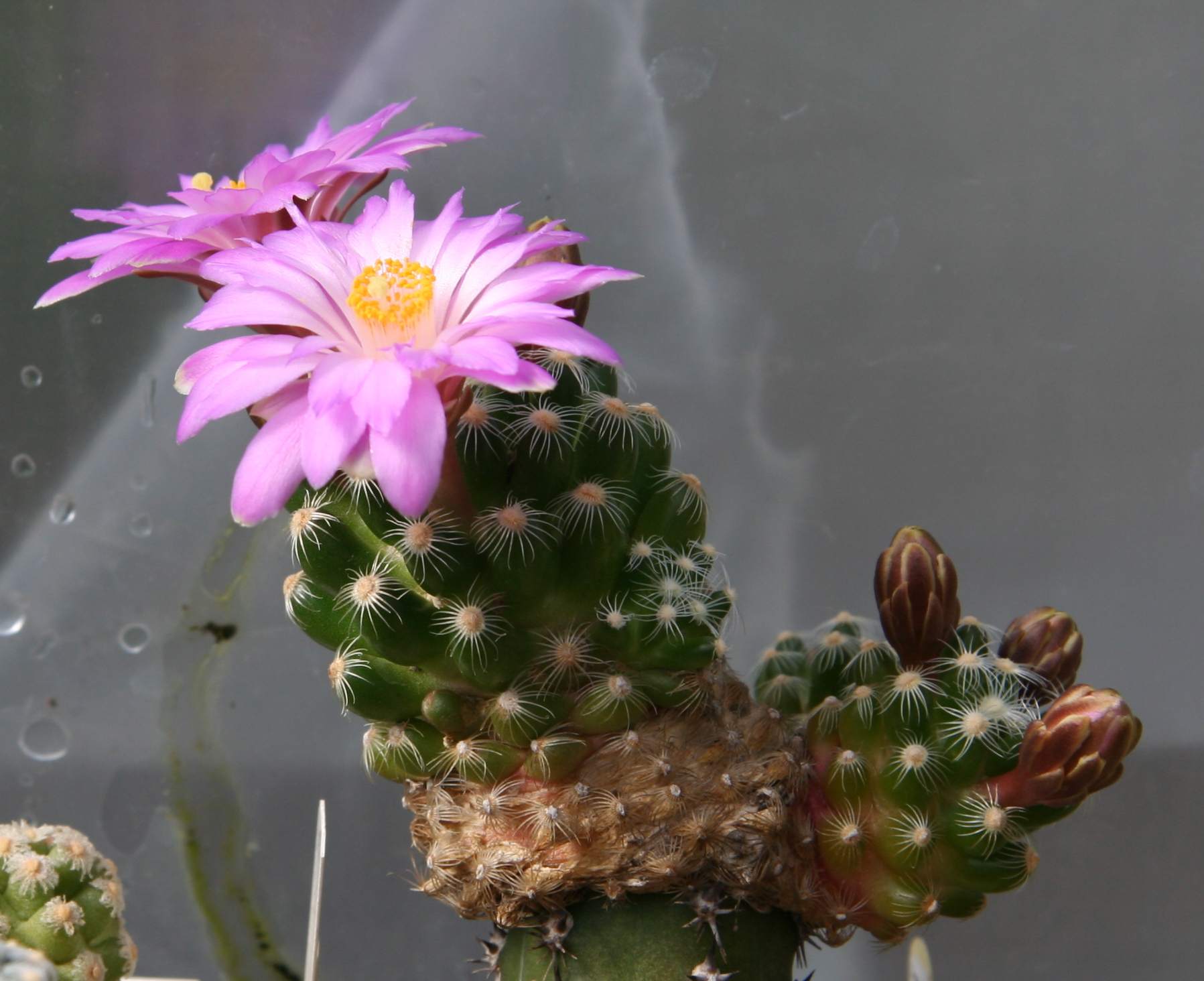 Mammillaria saboae subsp. roczekii